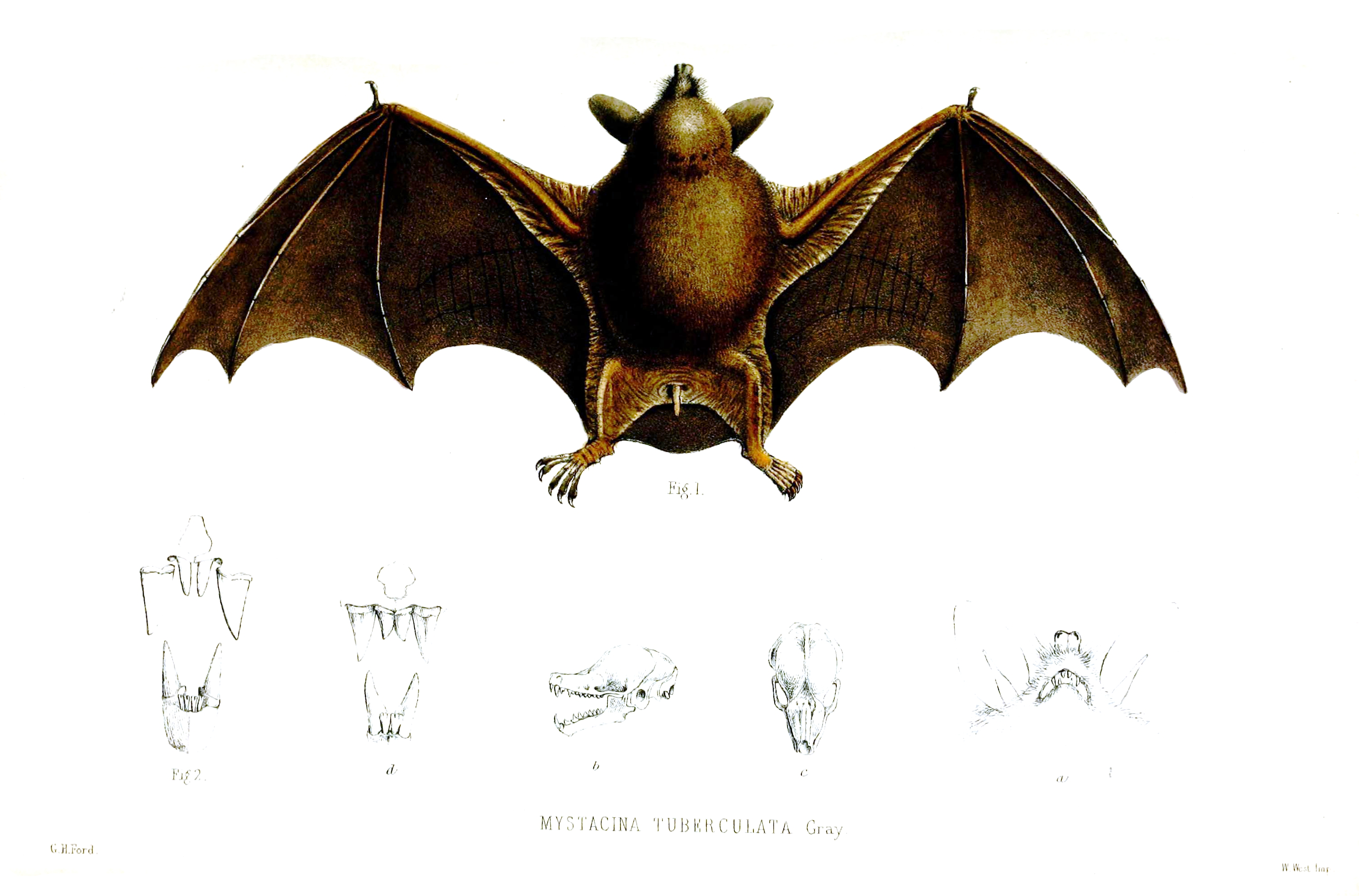 Mystacina tuberculata